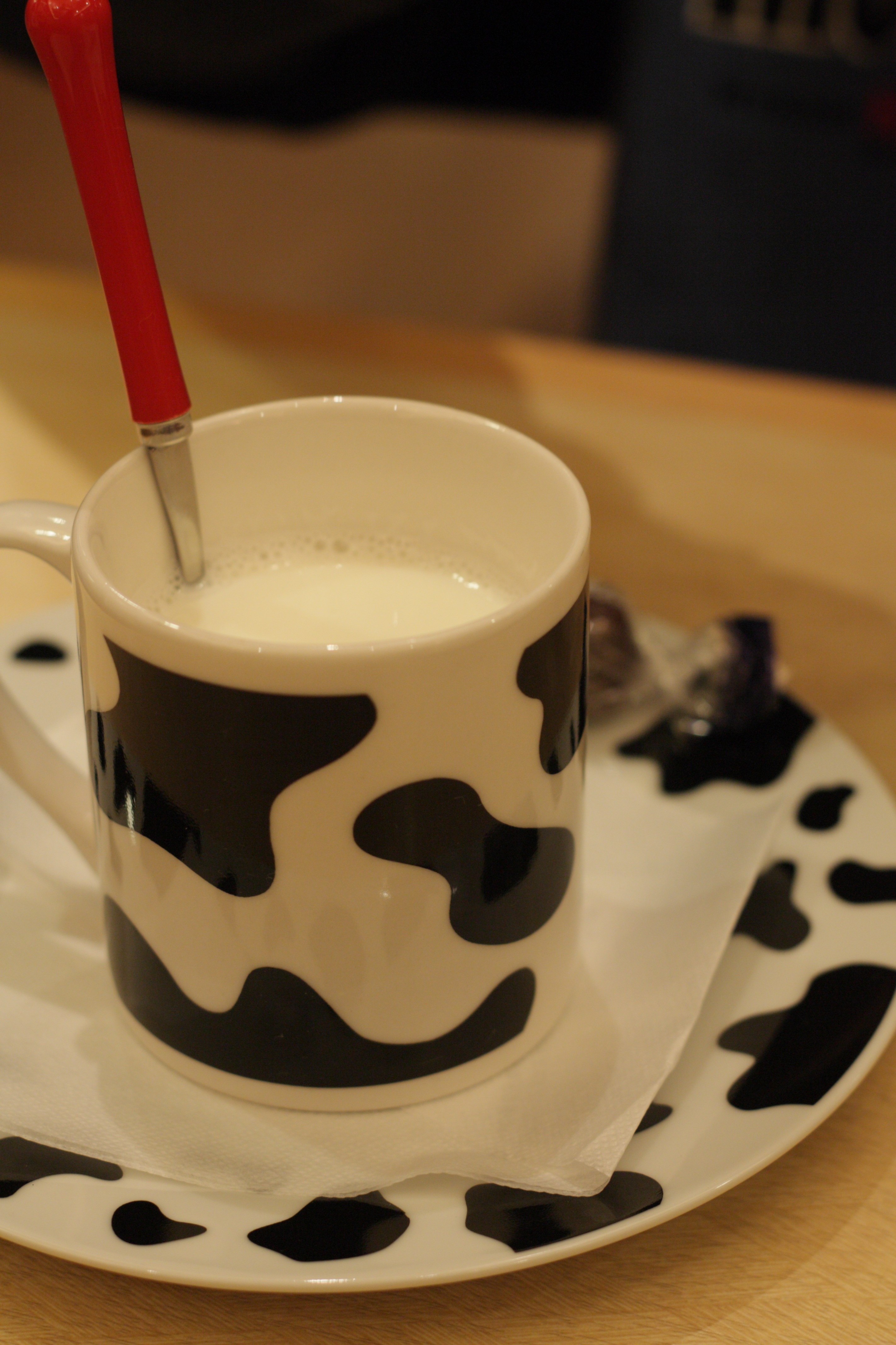 牛柄カップ